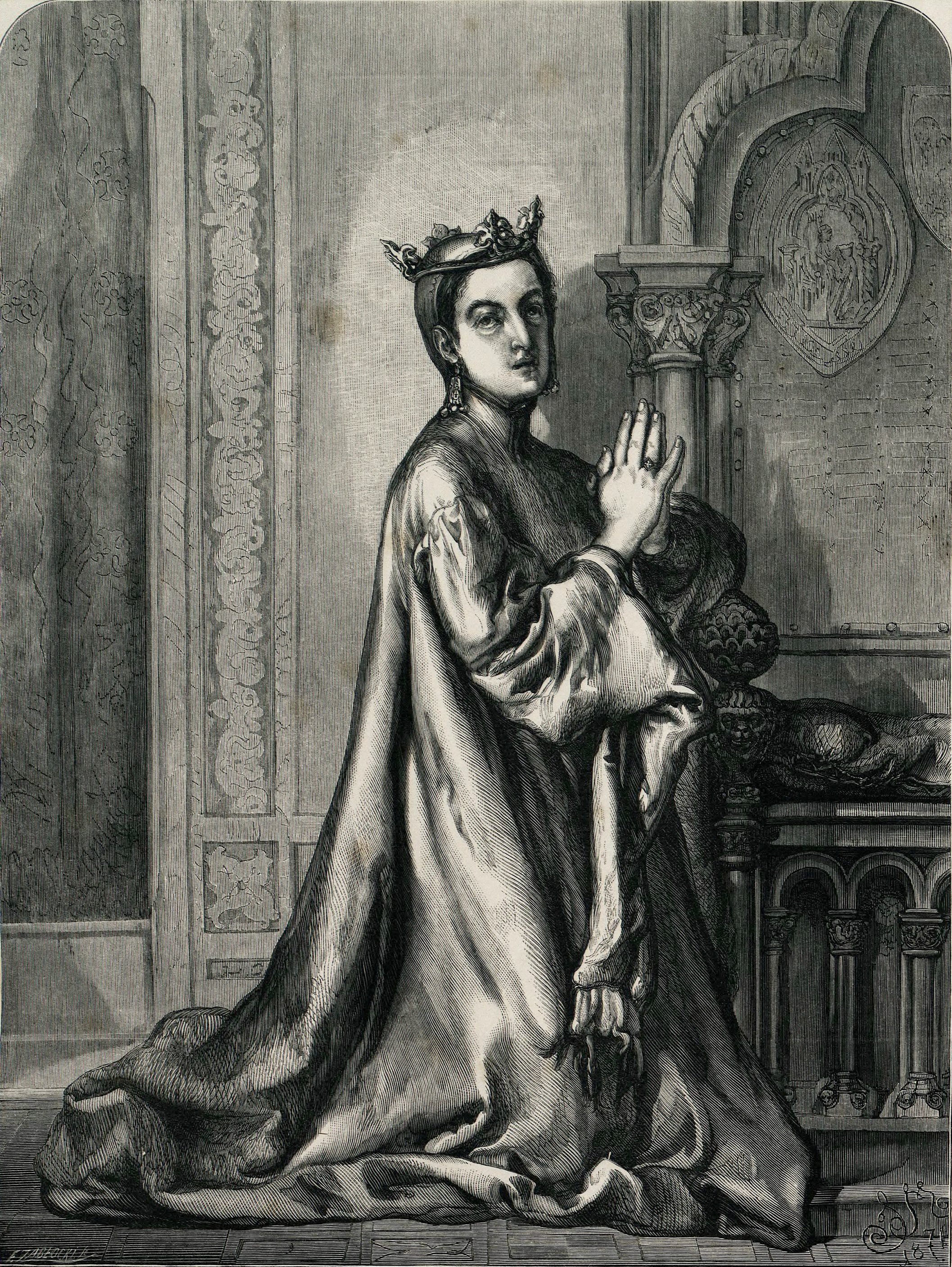 Święta Kinga (Kunegunda)